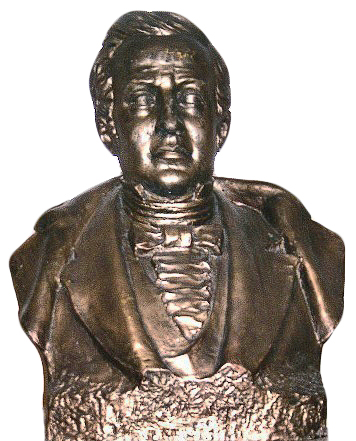 Imagen de frente del Busto del Dr. Mariano Moreno; escultura de Erminio Blotta (1892-1976) en la Estación Terminal de Ómnibus de Rosario, Argentina. Fotografía de Luis A. Blotta